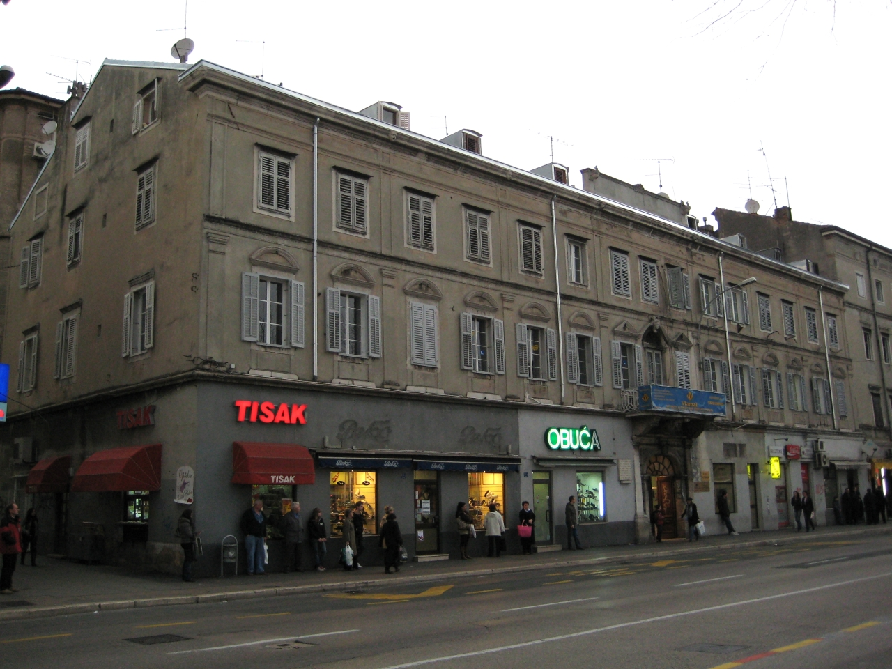 Palača Adamić u Rijeci